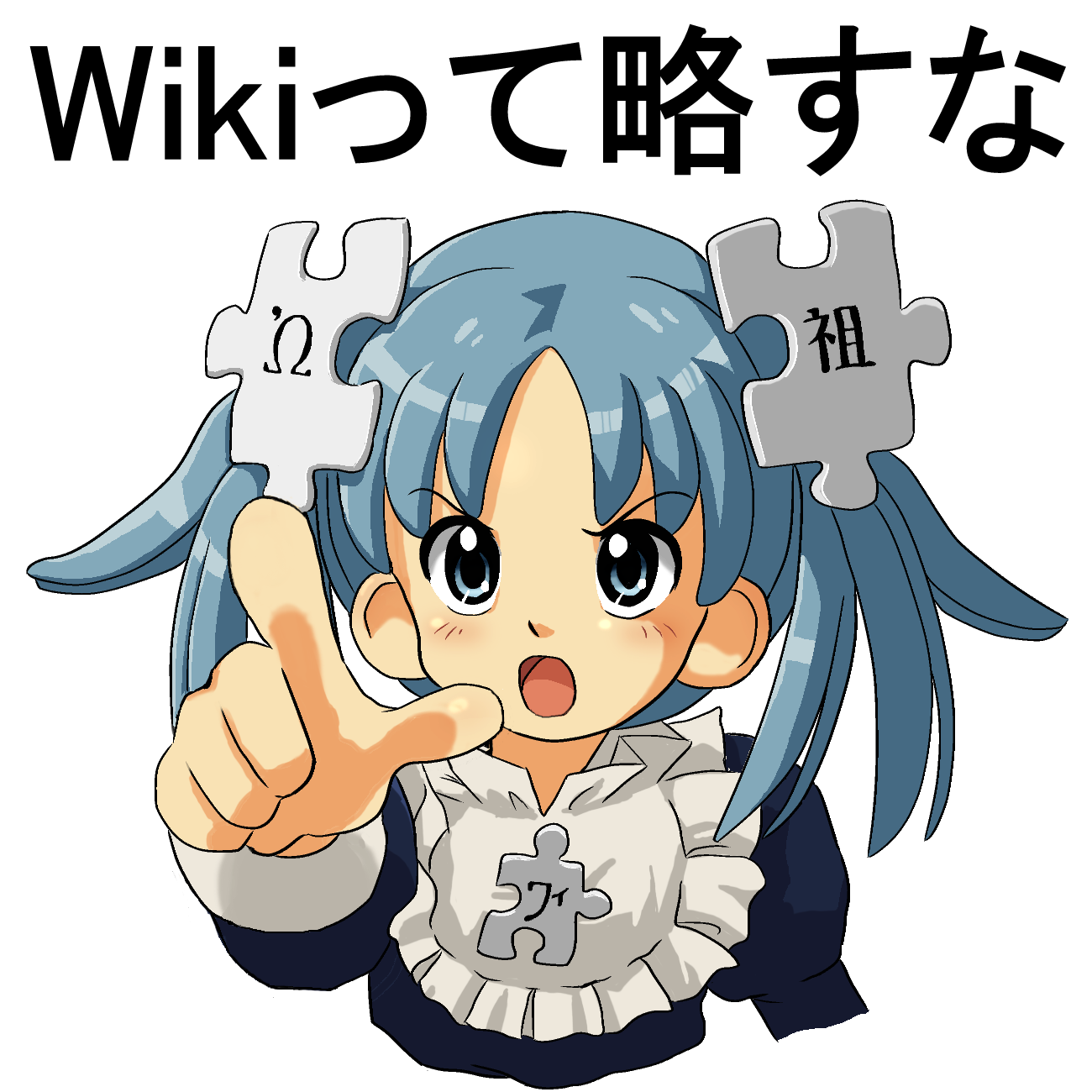 Wikipe-tan's illustration